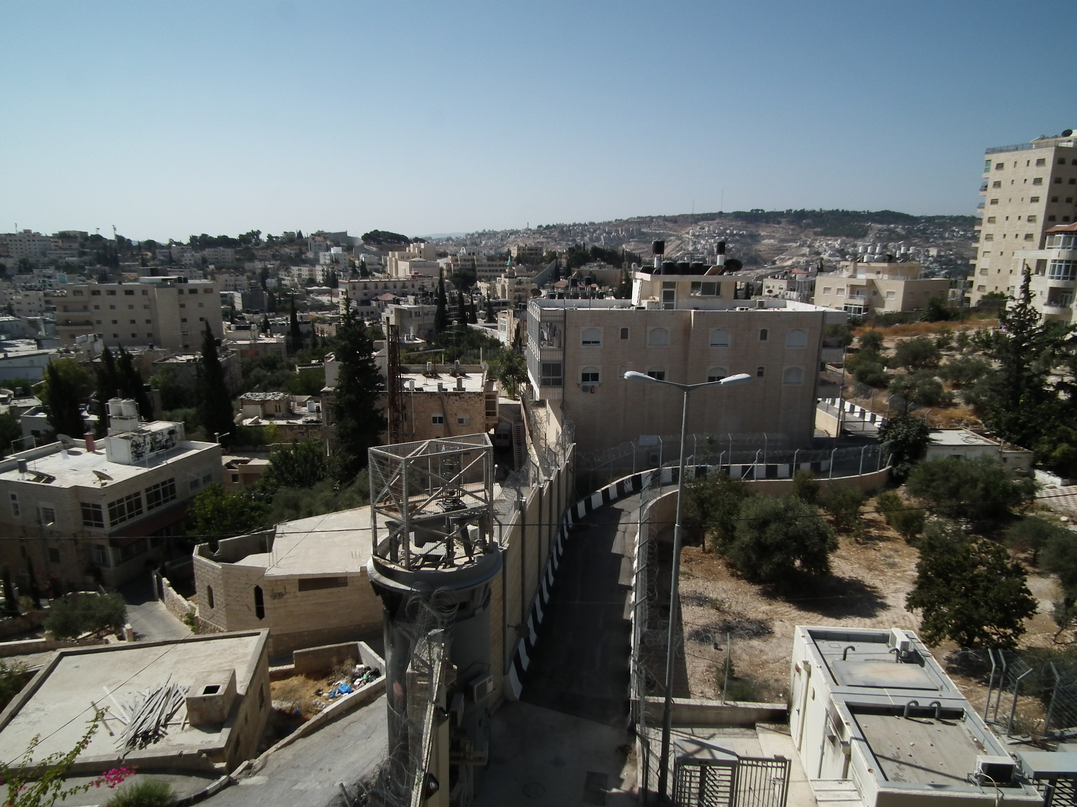 Vista della Barriera di separazione israeliana da Betania